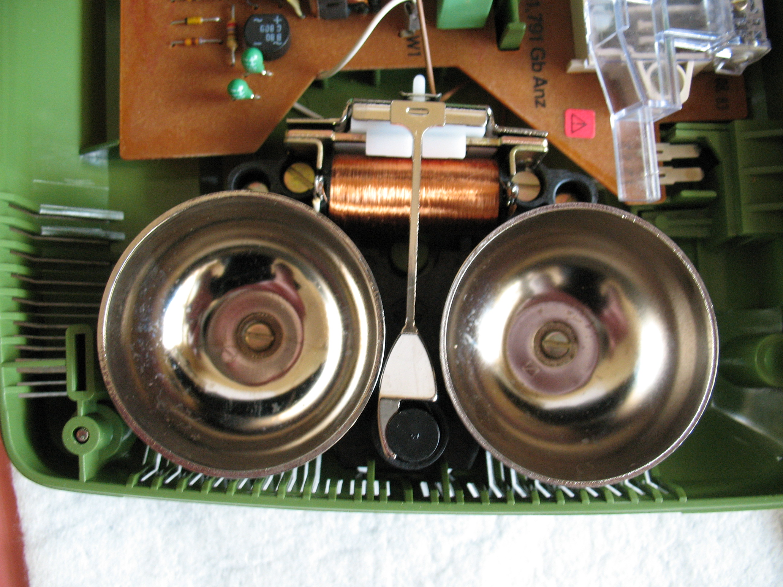 Zweischalenwecker eines Fernsprech-Tischapparates FeTAp 791